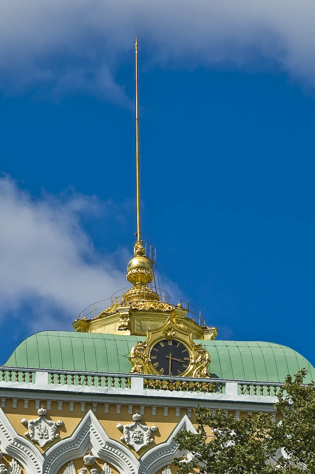 Grand Kremlin Palace